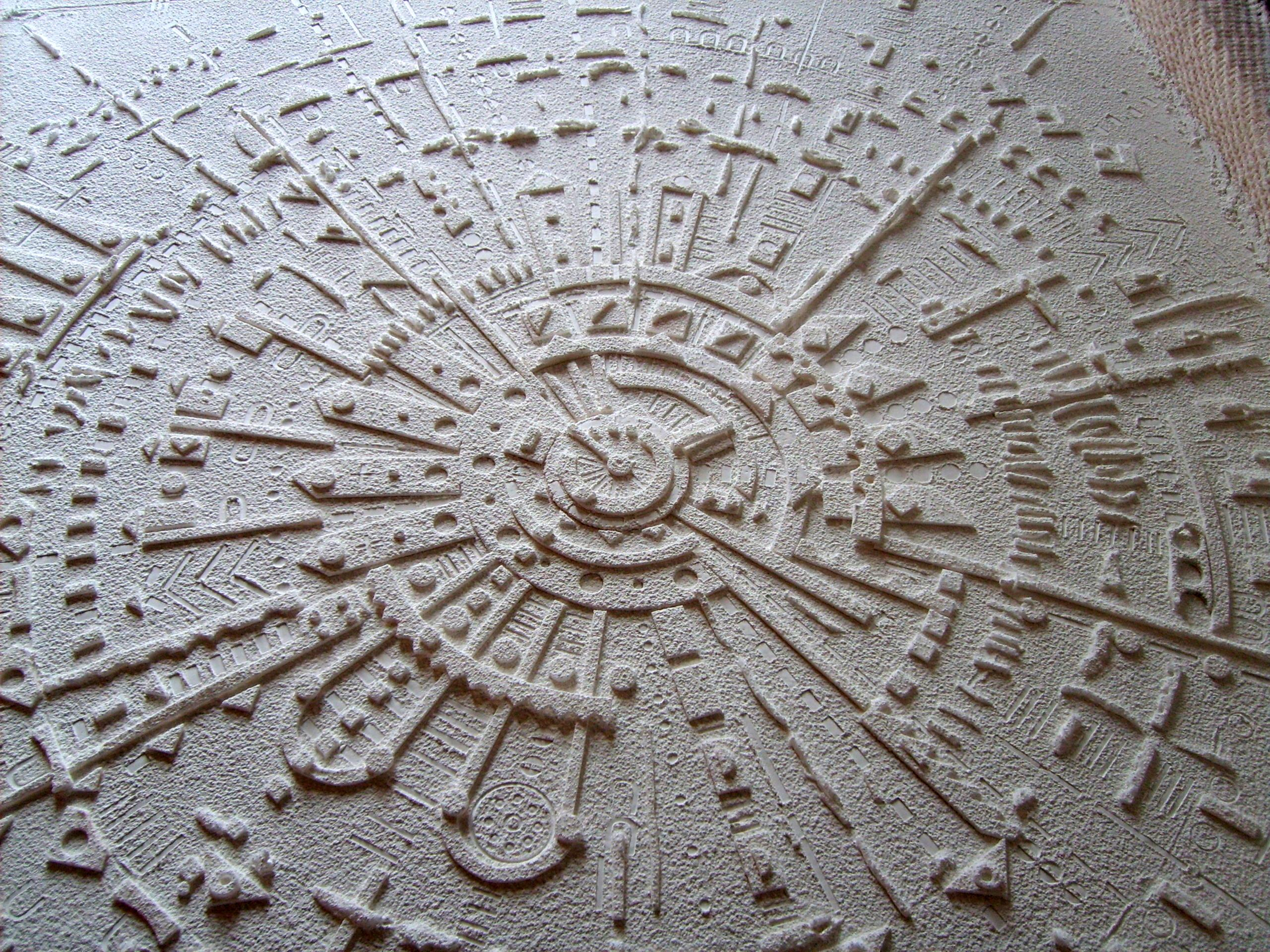 thermoformage du verre (crédit Roccella)